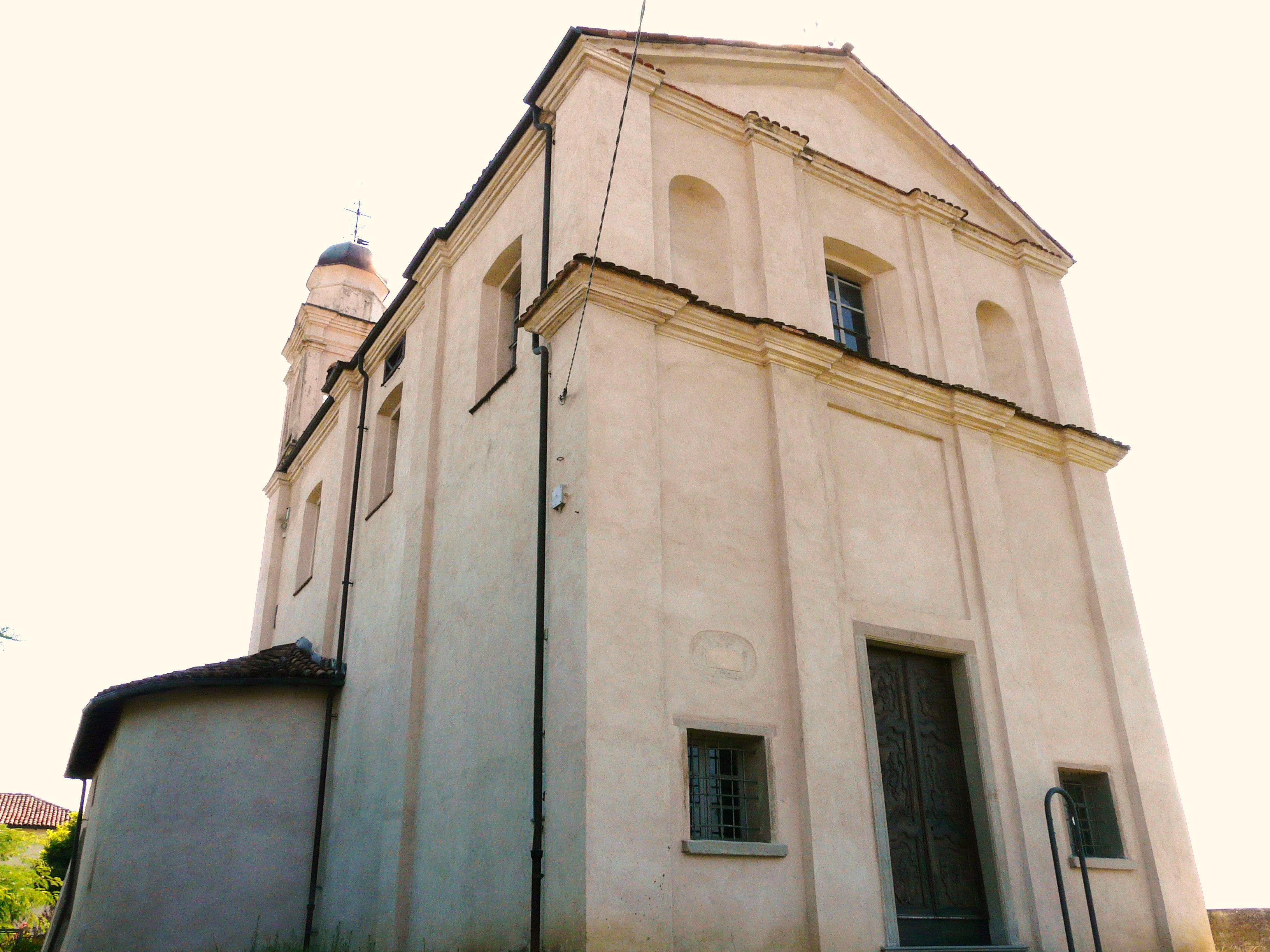 Chiesa di Santa Limbania, Rocca Grimalda, Piemonte, Italia